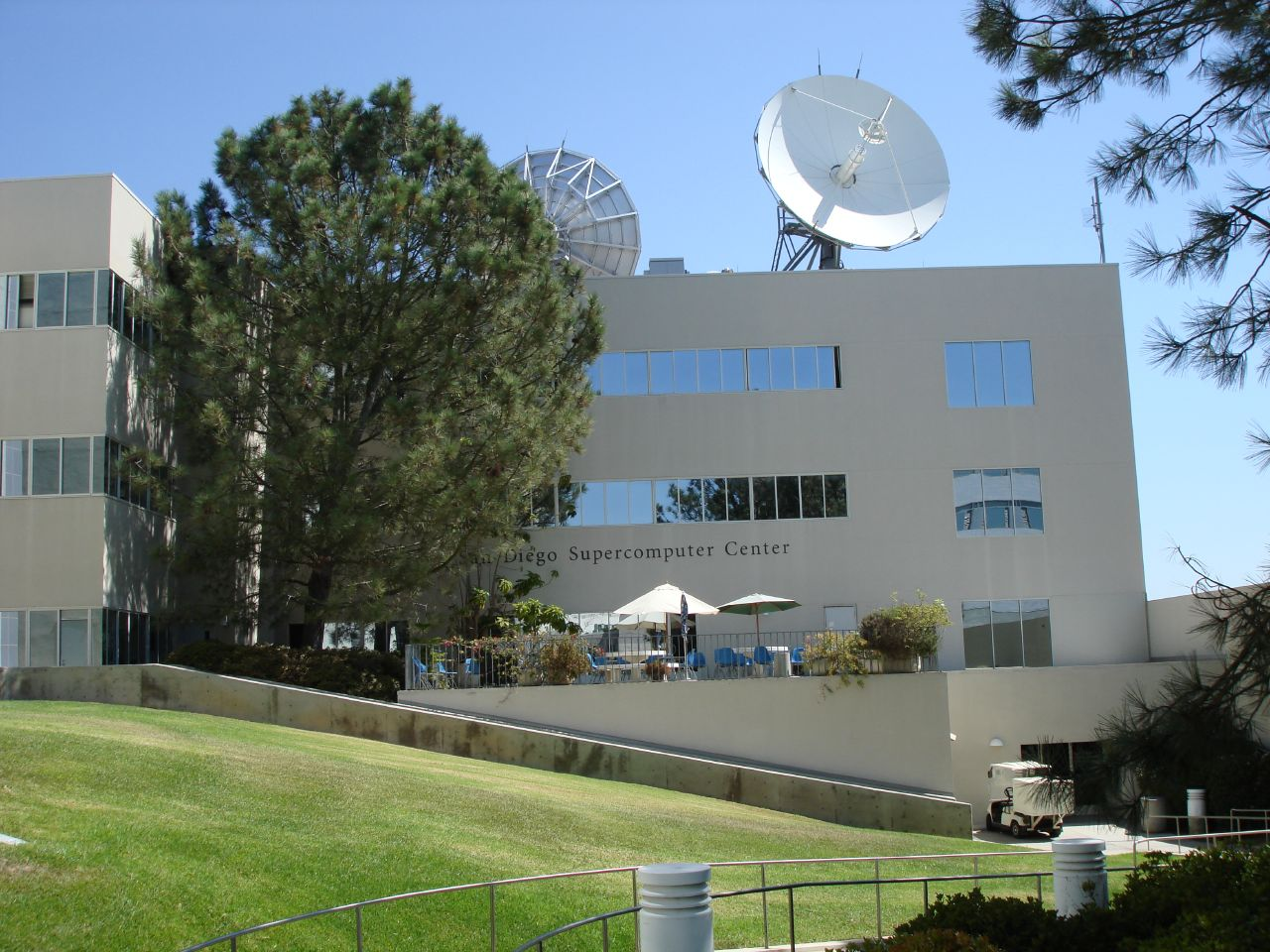 San Diego Supercomputer Center